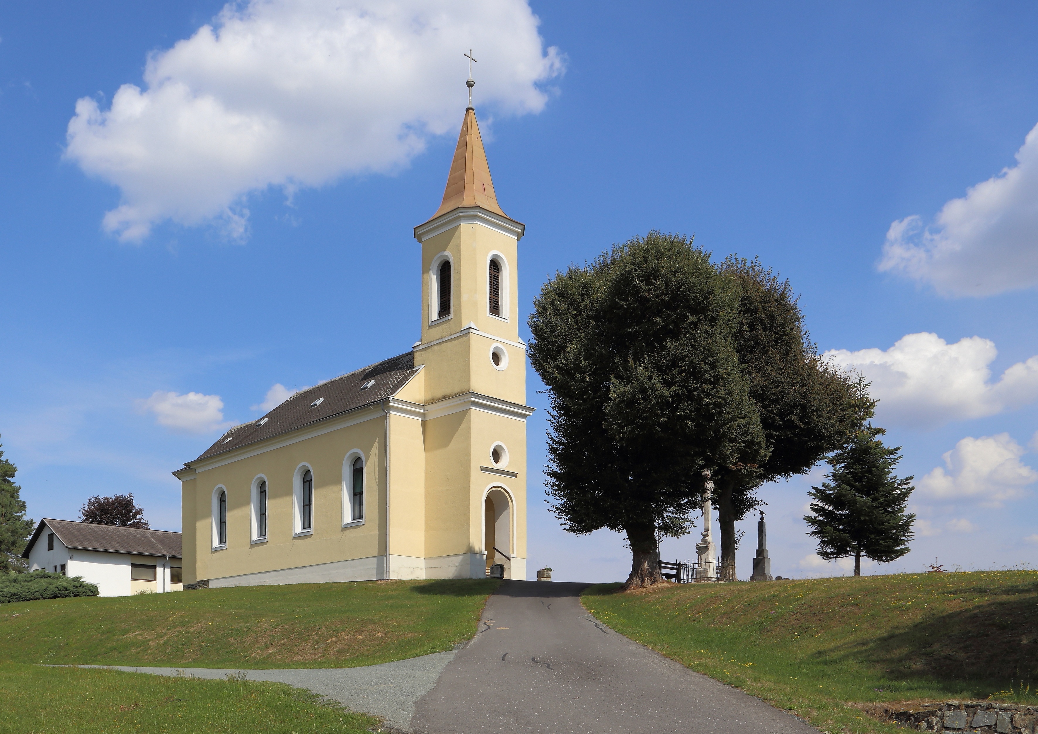 Katholische Filialkirche Christi Himmelfahrt in Reinersdorf, ein Ortsteil der burgenländischen Gemeinde Heiligenbrunn.